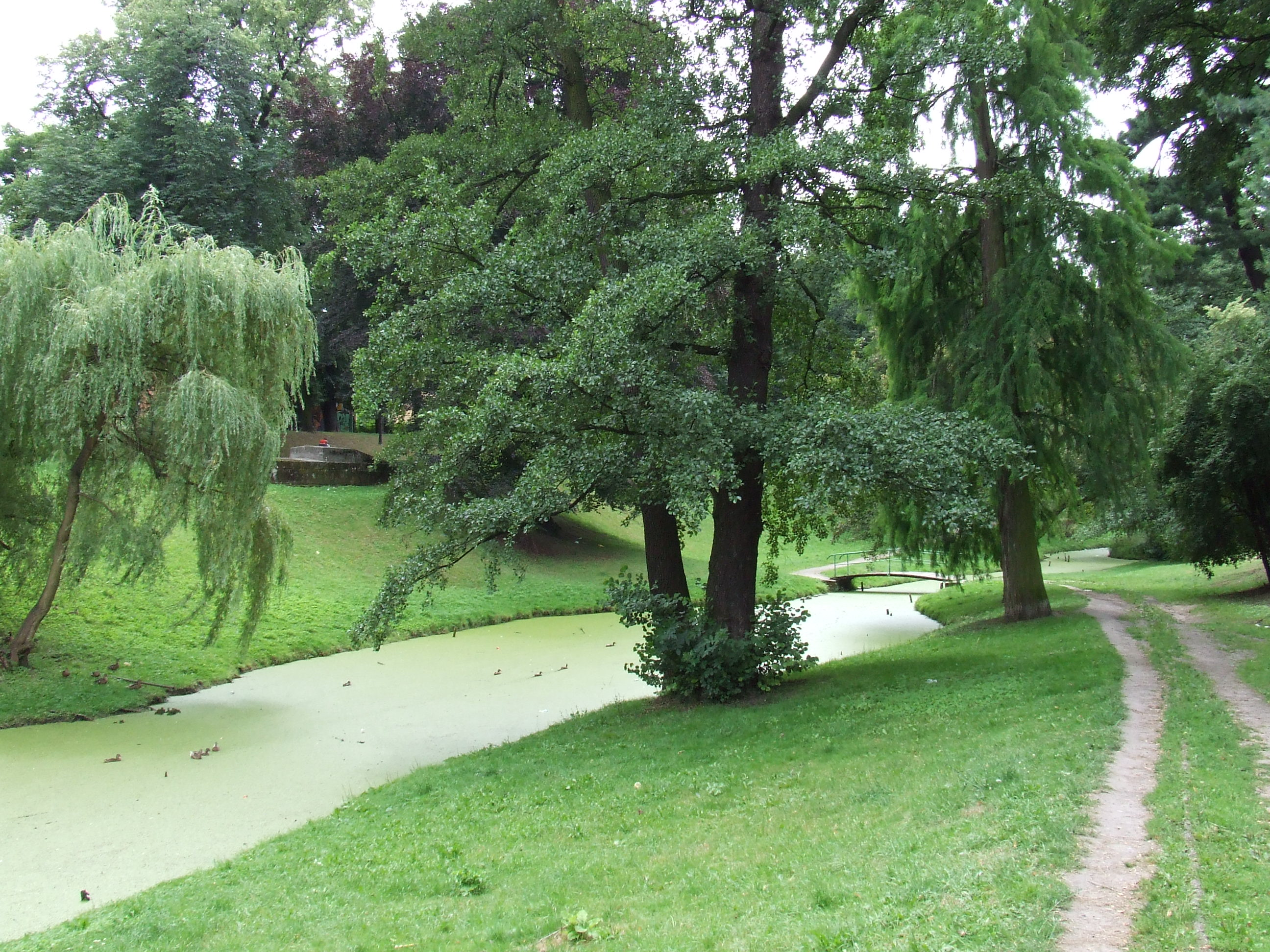 park Chrobrego w zespole plant miejskich Brzeg, Brzeg 03.1990.